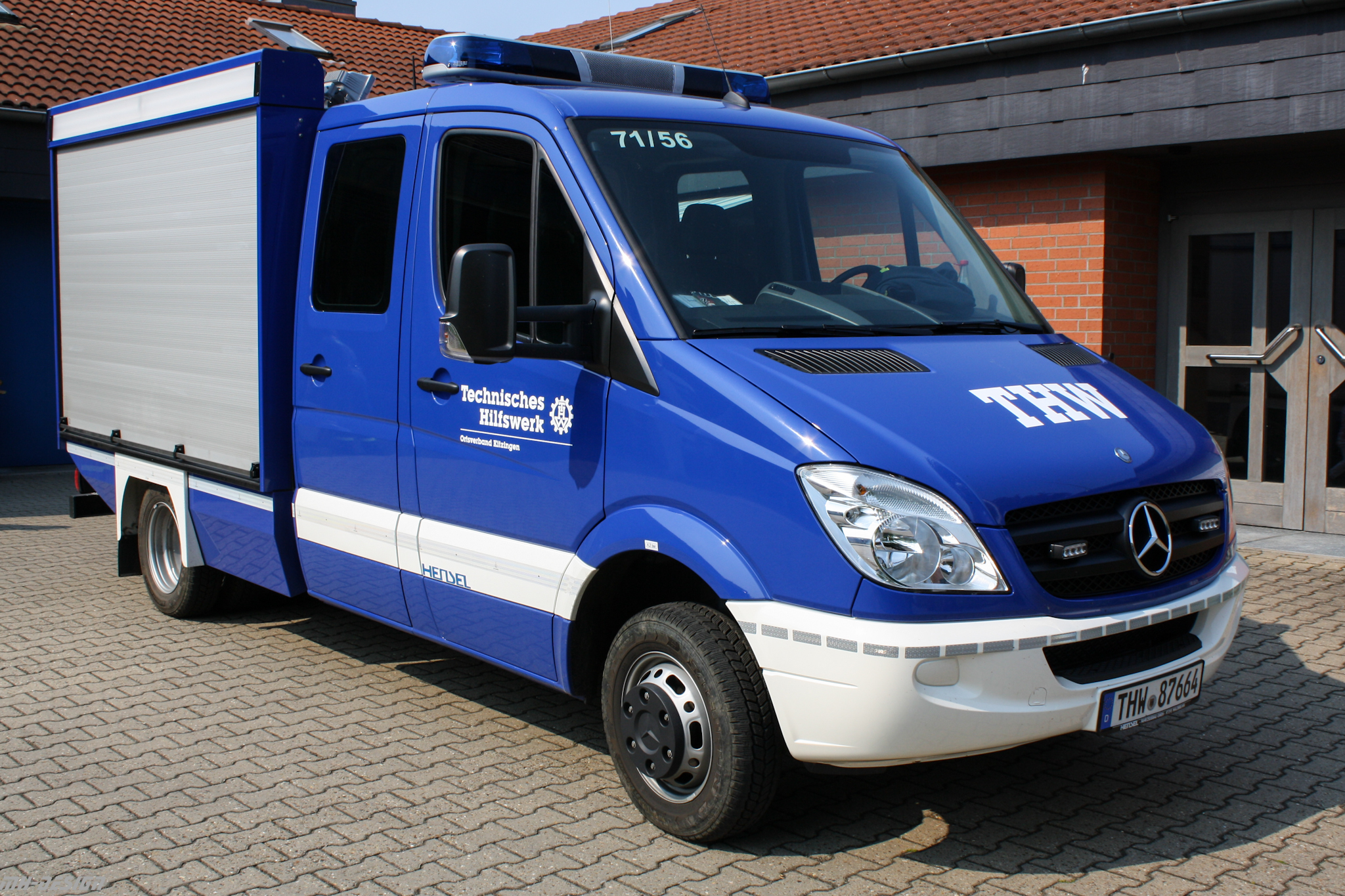 THW Einsatzfahrzeug, Primär für THV Bereitschaften und Einsätze auf den Bundesautobahnen